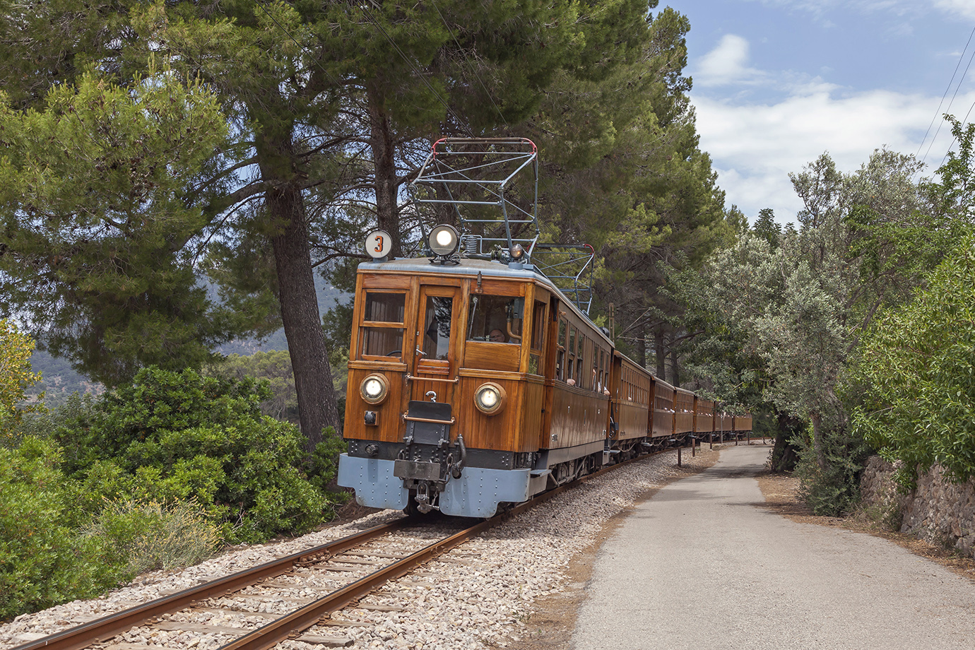 (нет в списке)